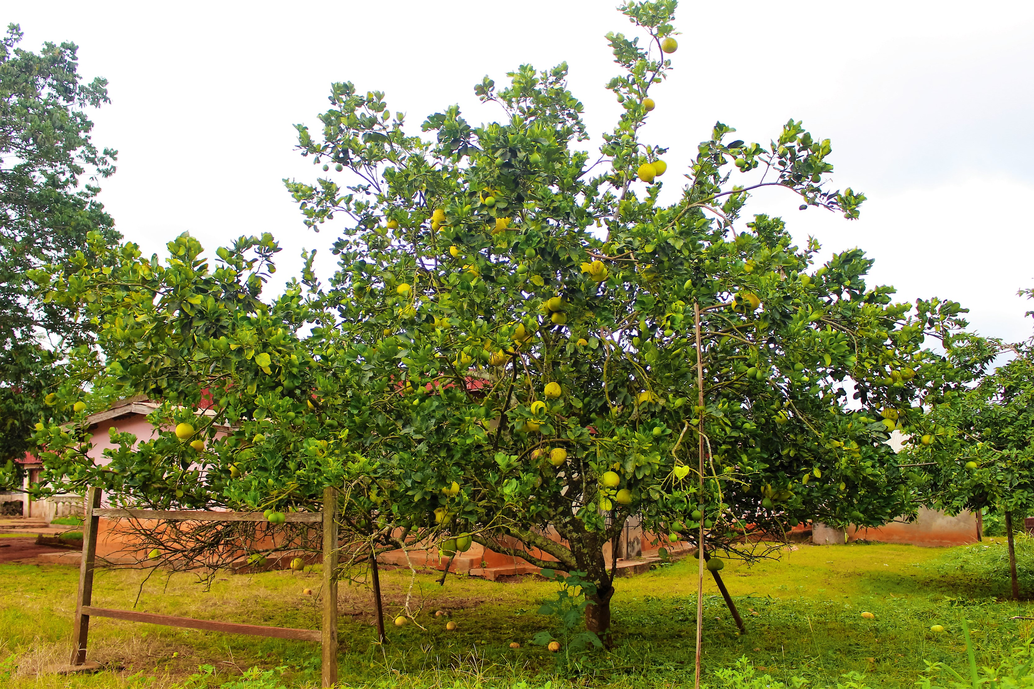 Fruits et légumes du village Ndanga Cameroun